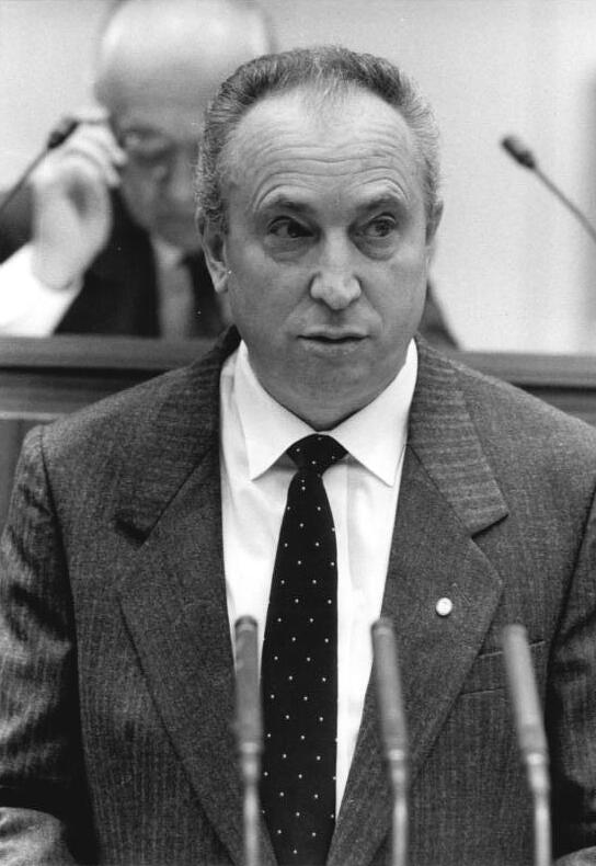 ADN-ZB/Mittelstädt 26.7.87- Berlin: Volkskammertagung Die Volkskammer der DDR trat zu ihrer 4. Tagung zusammen. Finanzminister Ernst Höfner begründete die Haushaltsrechnung für das Jahr 1986.